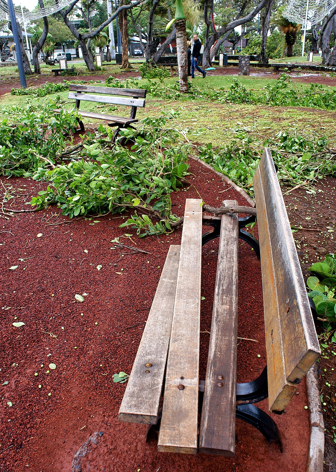 Cyclone Bejisa St Denis de La Reunion